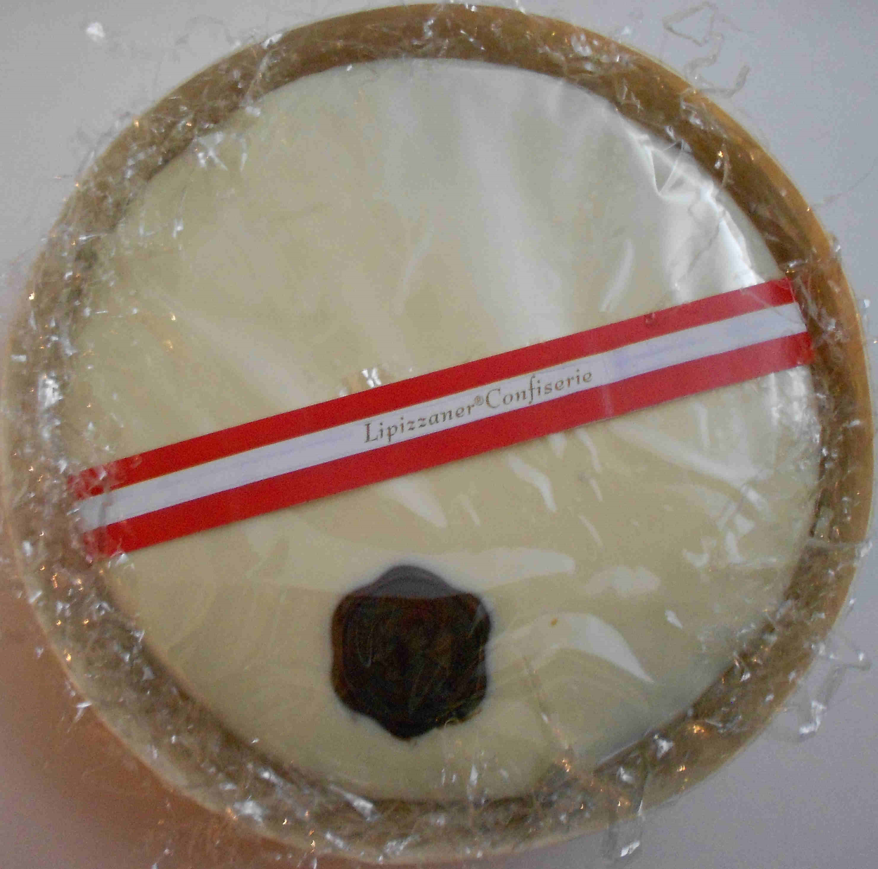 Classic chocolate cake remaining constantly juicy fresh for a long time thanks to the use of finely grated almonds instead of flour, accordingly certified glutenfree, coated with high-quality apricot jam and topped with finest white chocolate icing. This gives the cakes a long, fresh life unfolding its flavours more and more.